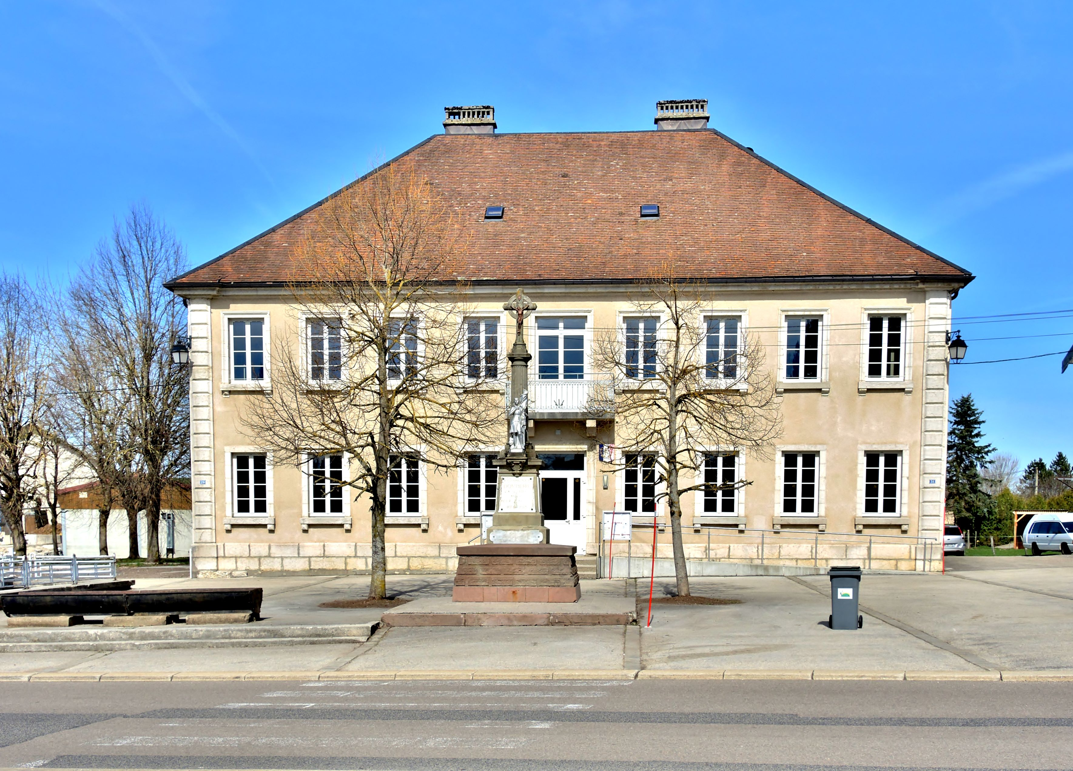 Façade de la mairie de Dompierre-les-Tilleuls